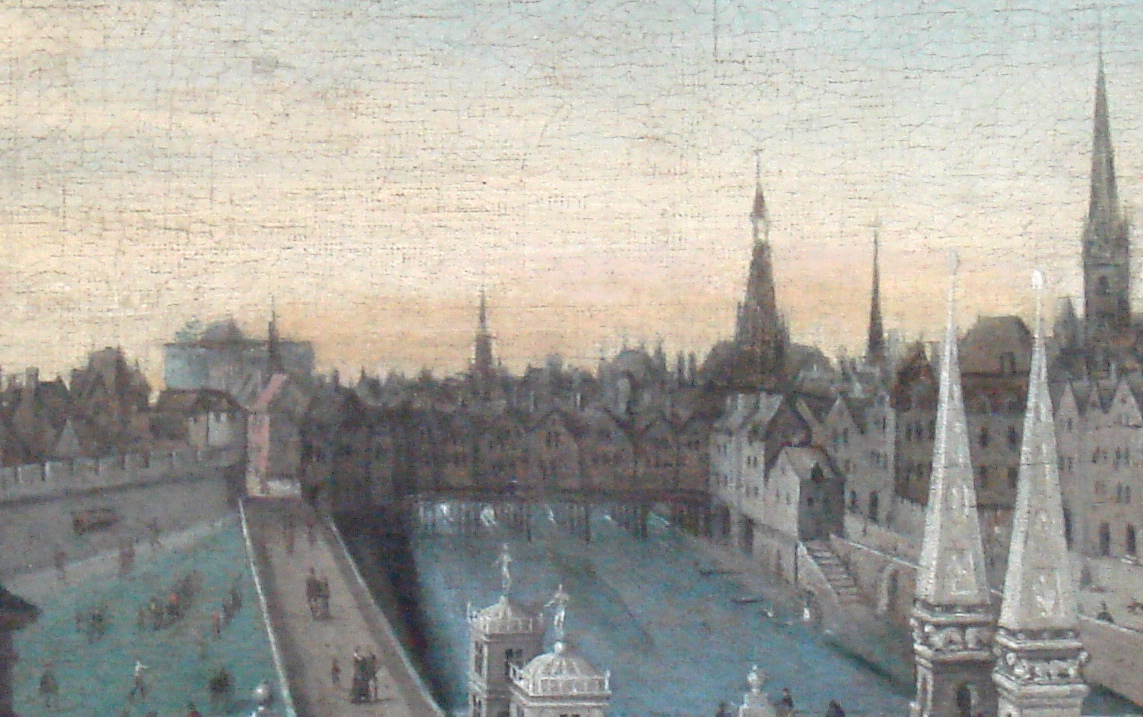 1577_Pont_Saint_Michel